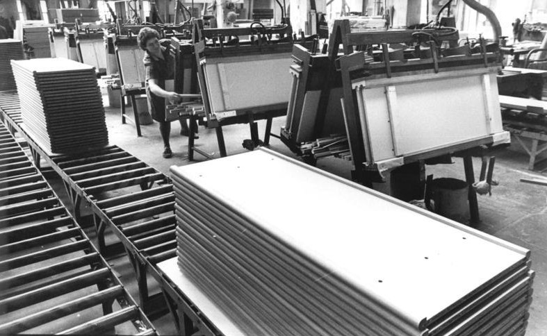 Probstzella, Möbelfabrik, Produktionsstraße ADN-ZB Kasper 21.7.88 Bez. Gera: Alle Schülertische werden im Betriebsteil Probstzella des Möbelwerkes Wurzbach hergestellt. Das Werk liefert Tische in vier Größen an die Einrichtungen der Volksbildung. Ein weiters Modell wird zur Zeit in der Paxis getestet. In Probstzella werden außerdem Profilleisten für Kooperationspartner der Möbelindustrie produziert.